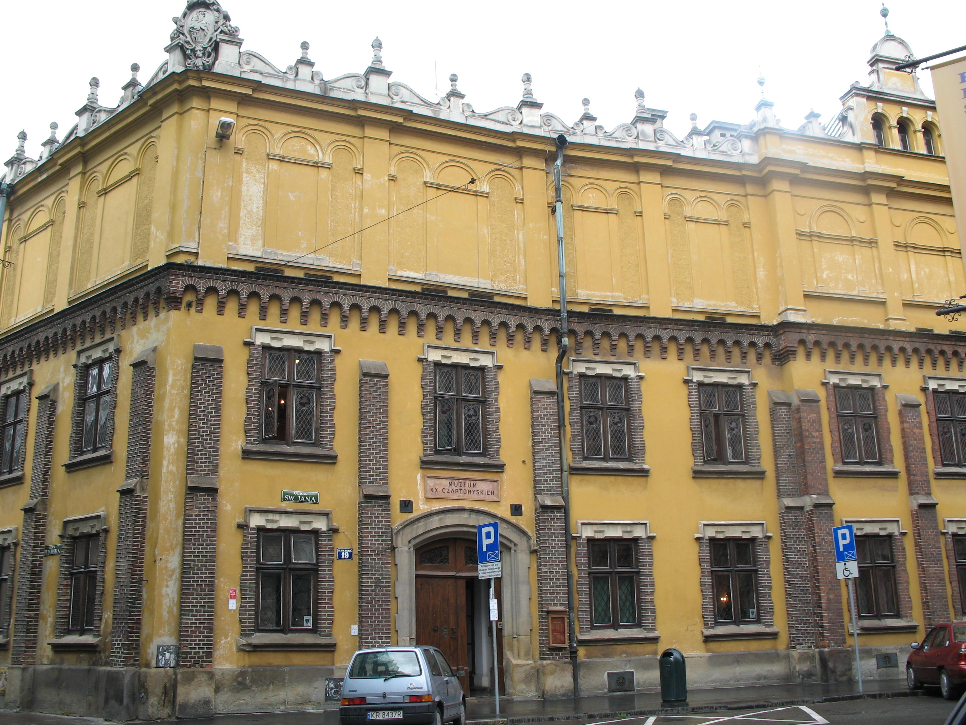 Pijarska in Kraków, Poland